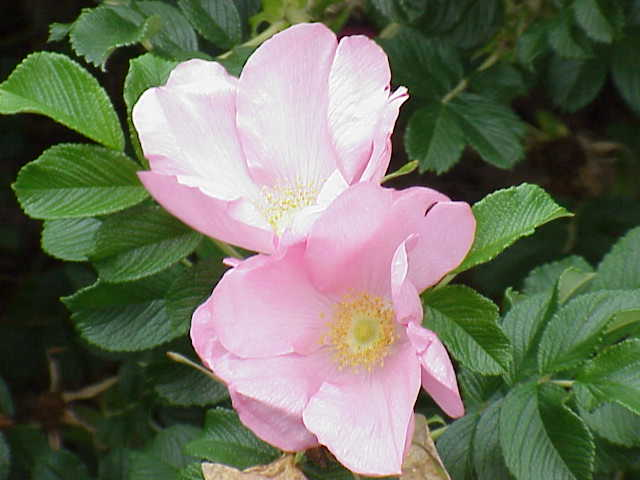 Species: Rosa rugosa cultivar Family: Rosaceae Cultivar: 'Fru Dagmar Hastrup', Poulsen 1914 Image No. 1